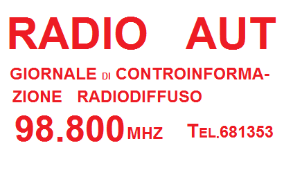 Cartellone di Radio Aut (1976-1978), radio libera di Terrasini (PA) del gruppo Musica e Cultura di Democrazia Proletaria guidato da Giuseppe "Peppino" Impastato.